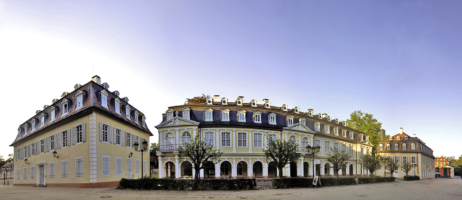 Kurgebäude der ehemaligen Kuranlage Wilhelmsbad in Hanau.